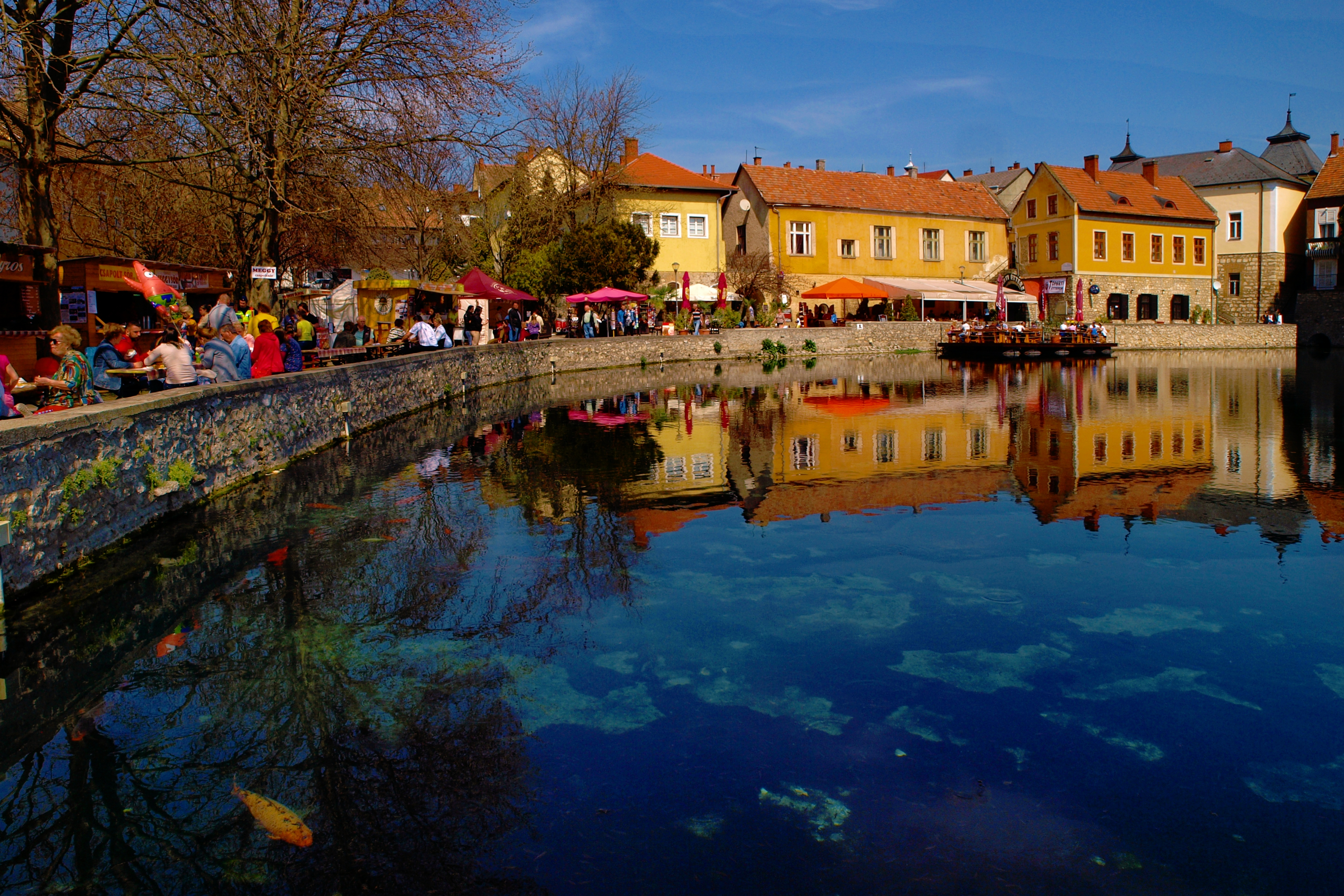 Malom-tó 2015 áprilisában. 'Tó környék (Nagytó és Kistó) és Templomdomb' műemlék azonosítója: -3622.